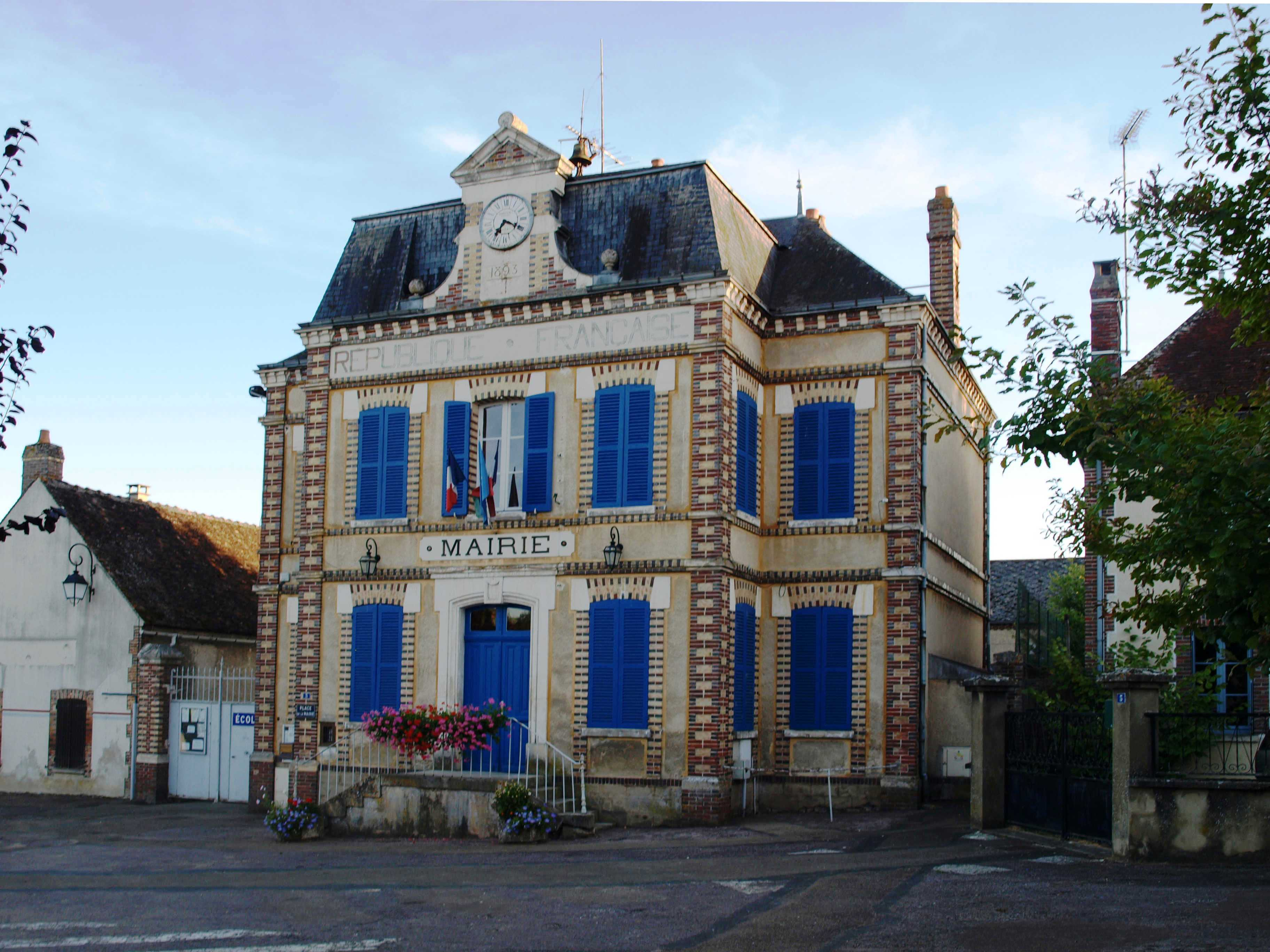 La Celle-Saint-Cyr (Yonne) ; la mairie